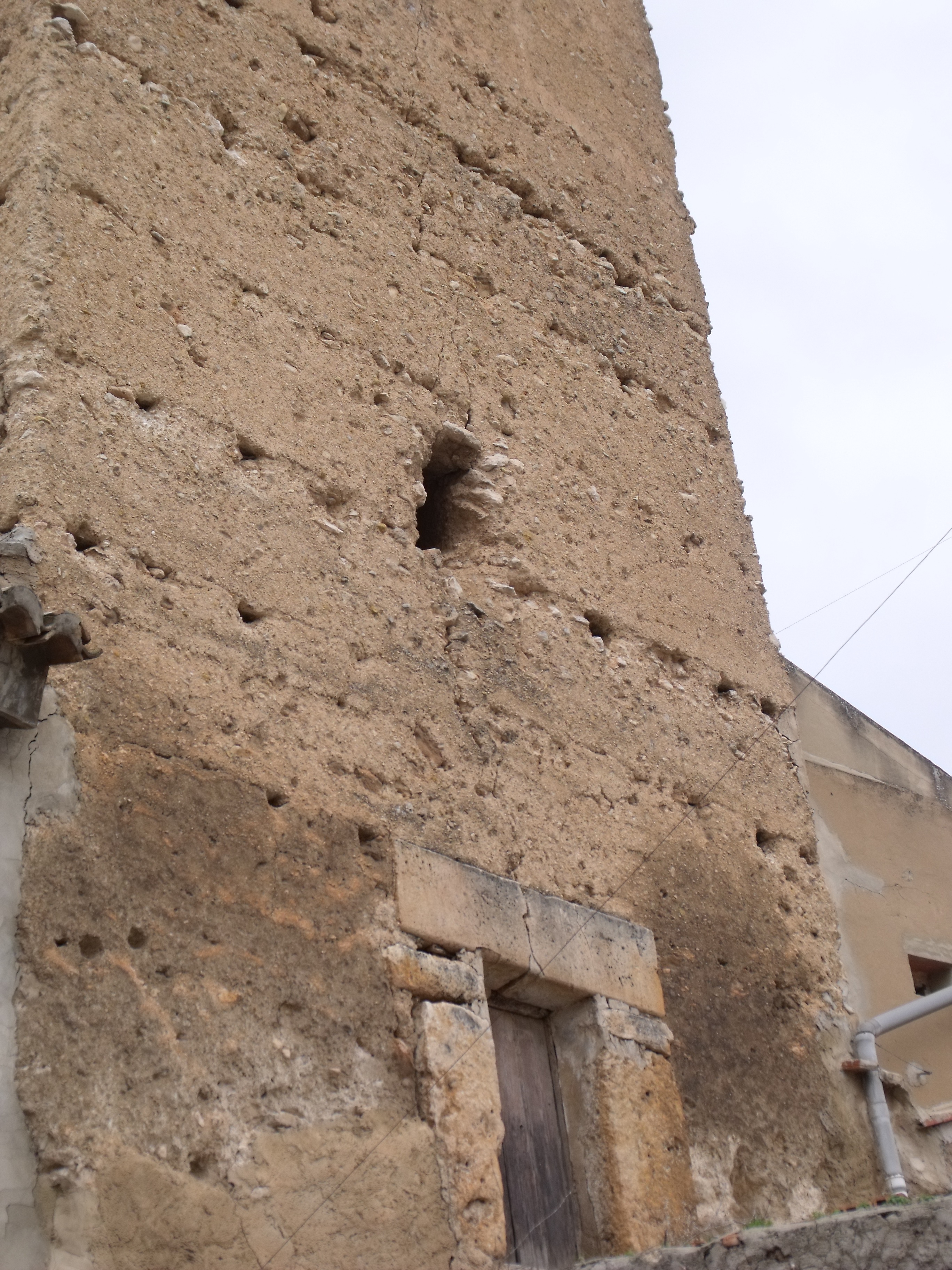 Torre árabe de Godelleta.